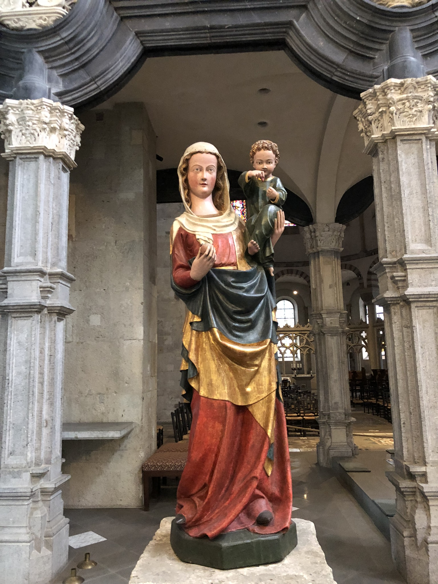 „Limburger Madonna“ aus Maria im Kapitol, Köln